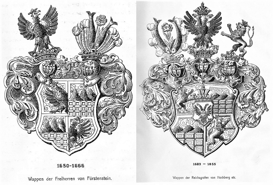 Herby Hochbergów